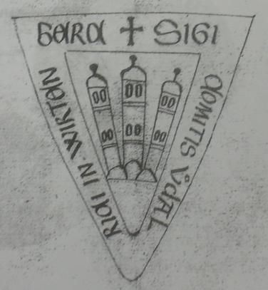 de: Siegel eines Grafen von Württemberg von 1238 en: Seal of a count of Württemberg in 1238